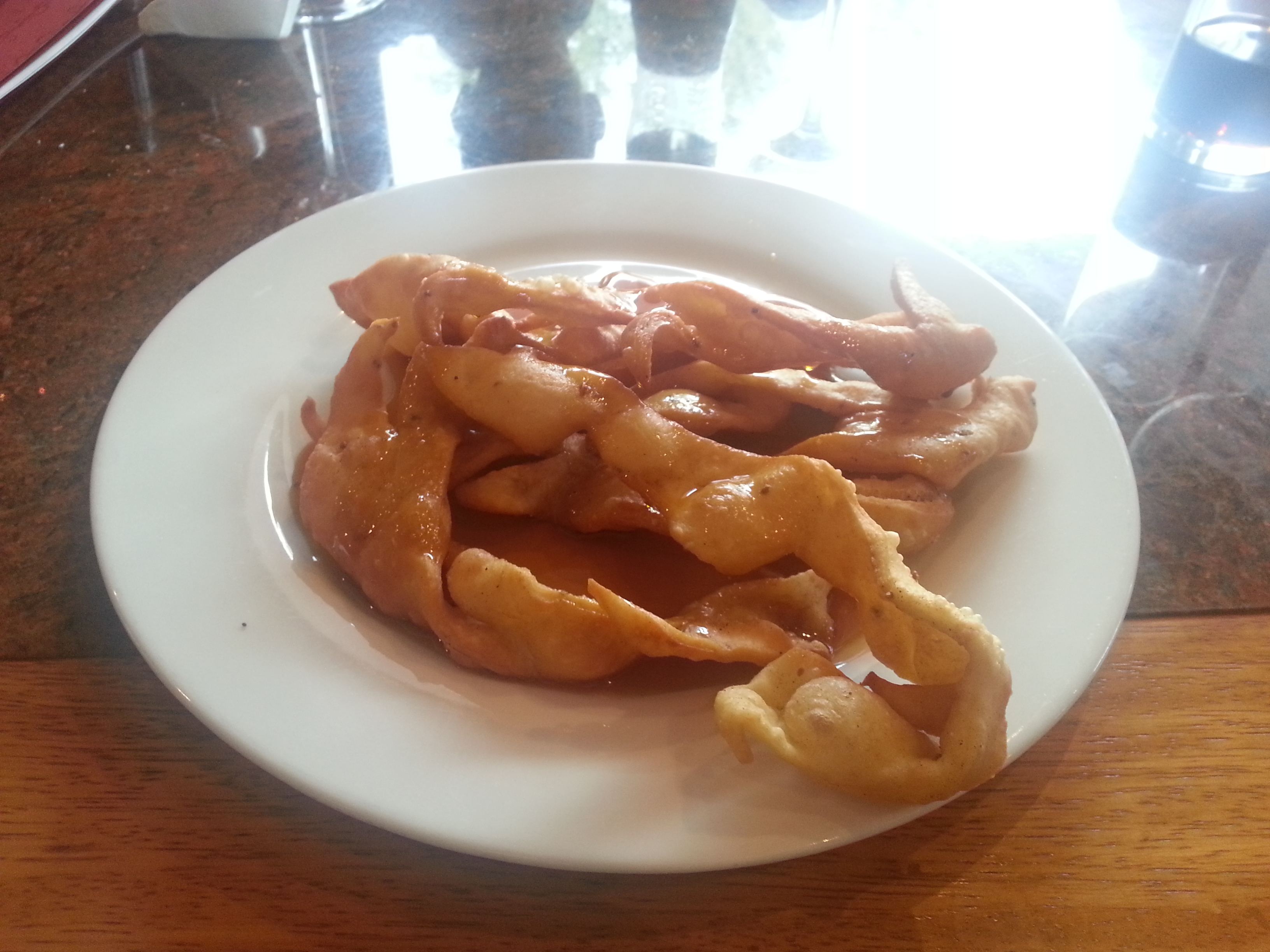 Pristiño